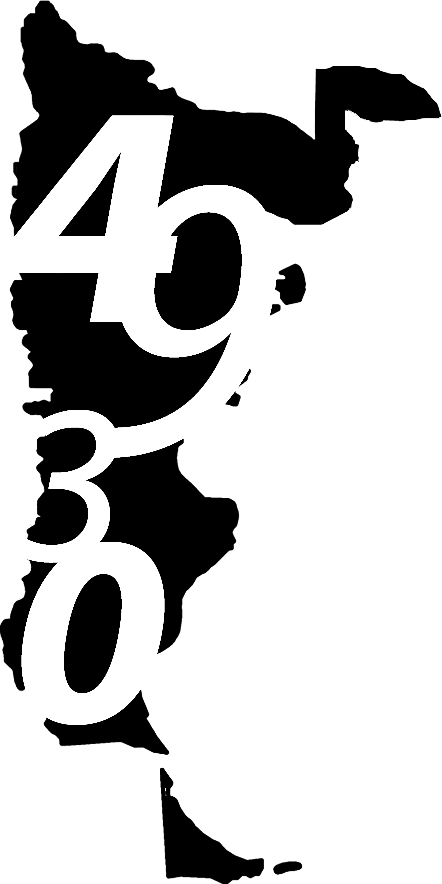 El logotipo fue votado y elegido durante la asamblea llevada a cabo en Punta Alta del 31 de Abril al 1 de Mayo durante el 2011.